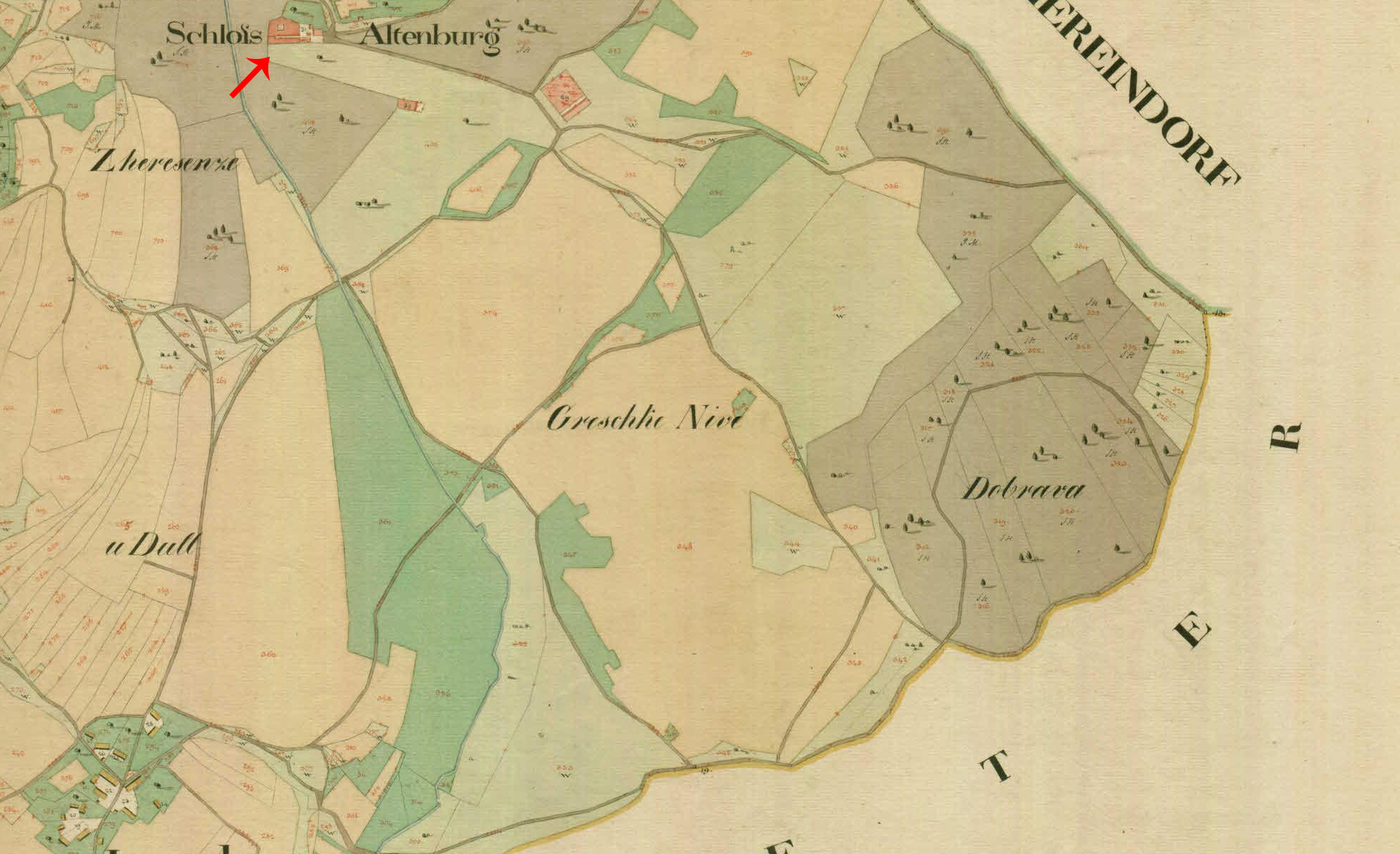 Franciscejski kataster za Kranjsko, 1823-1869